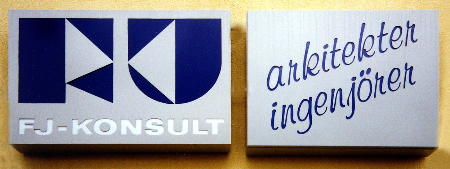 FJ-Konsults firmaskylt vid Hägerstensvägen 181